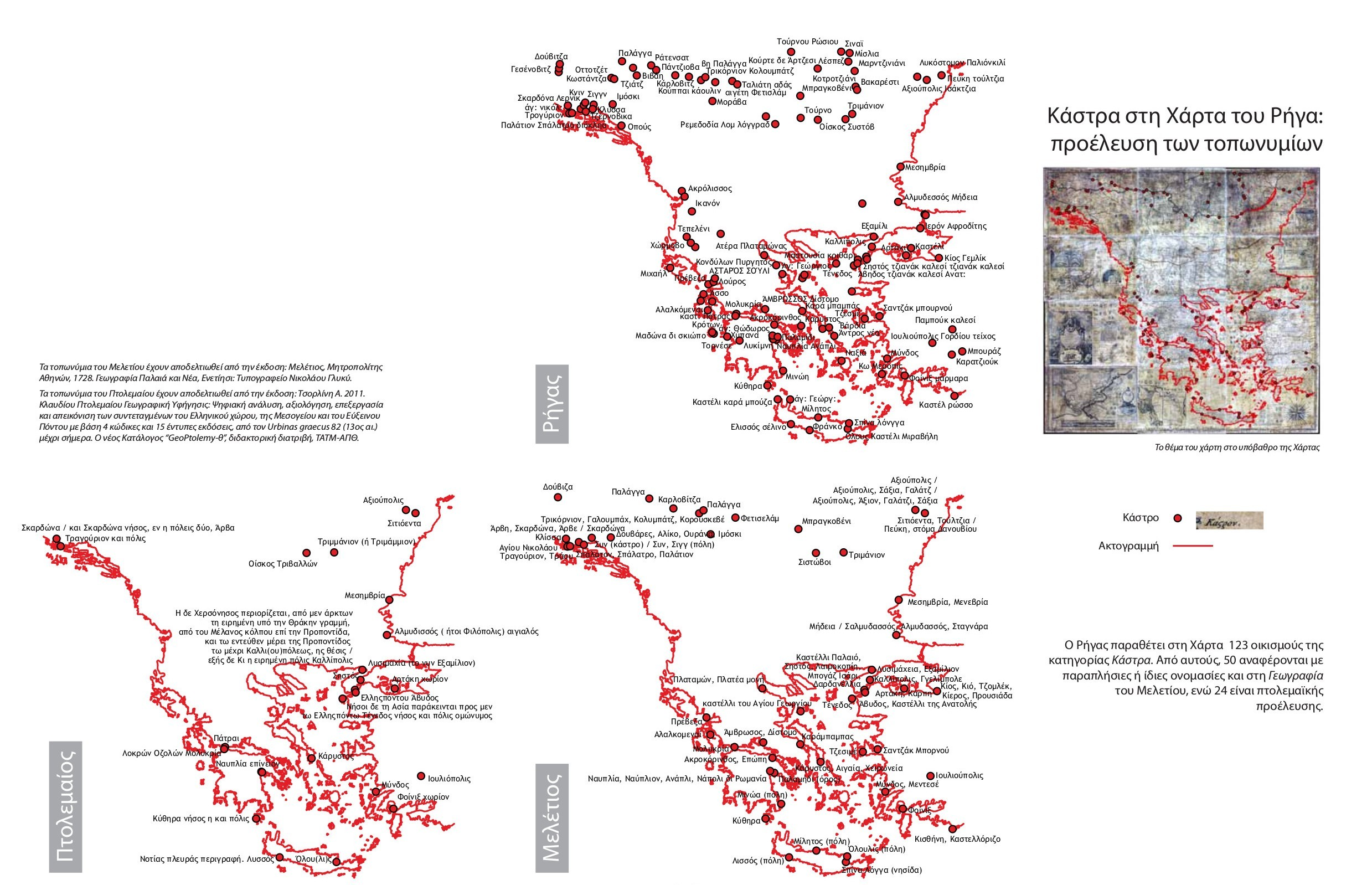 Κάστρα στη Χάρτα του Ρήγα - προέλευση τοπονυμίων